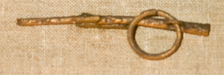 Булавка с кольцом, бронза. (VIII-IX век). Археологические раскопки 1970ых годов, городище Камно, Псковская область. Государственный музей истории Санкт-Петербурга.